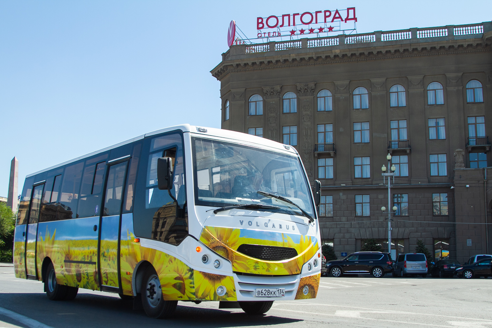 Автобус Volgabus-4298.G8 в Волгограде